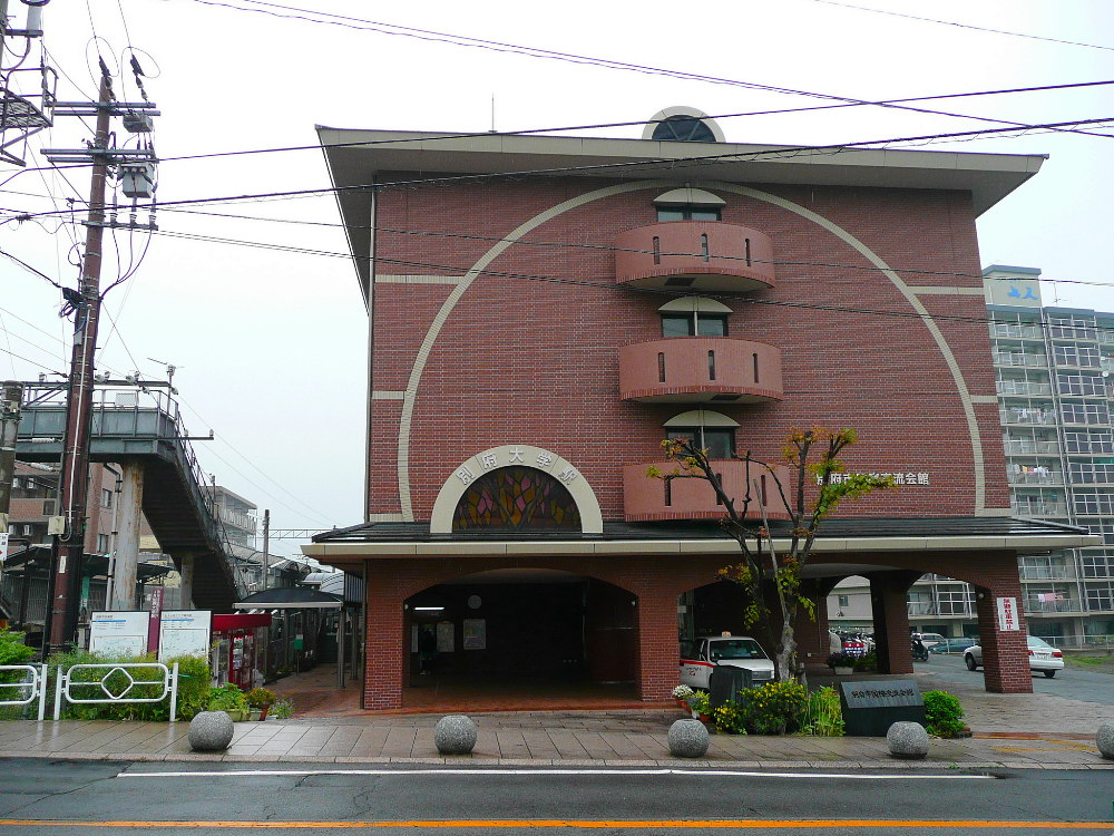 日豊本線別府大学駅・駅舎 投稿者↑PON（ウエポン）が2007年5月5日に撮影 一部編集の上で2007年5月12日にアップロード